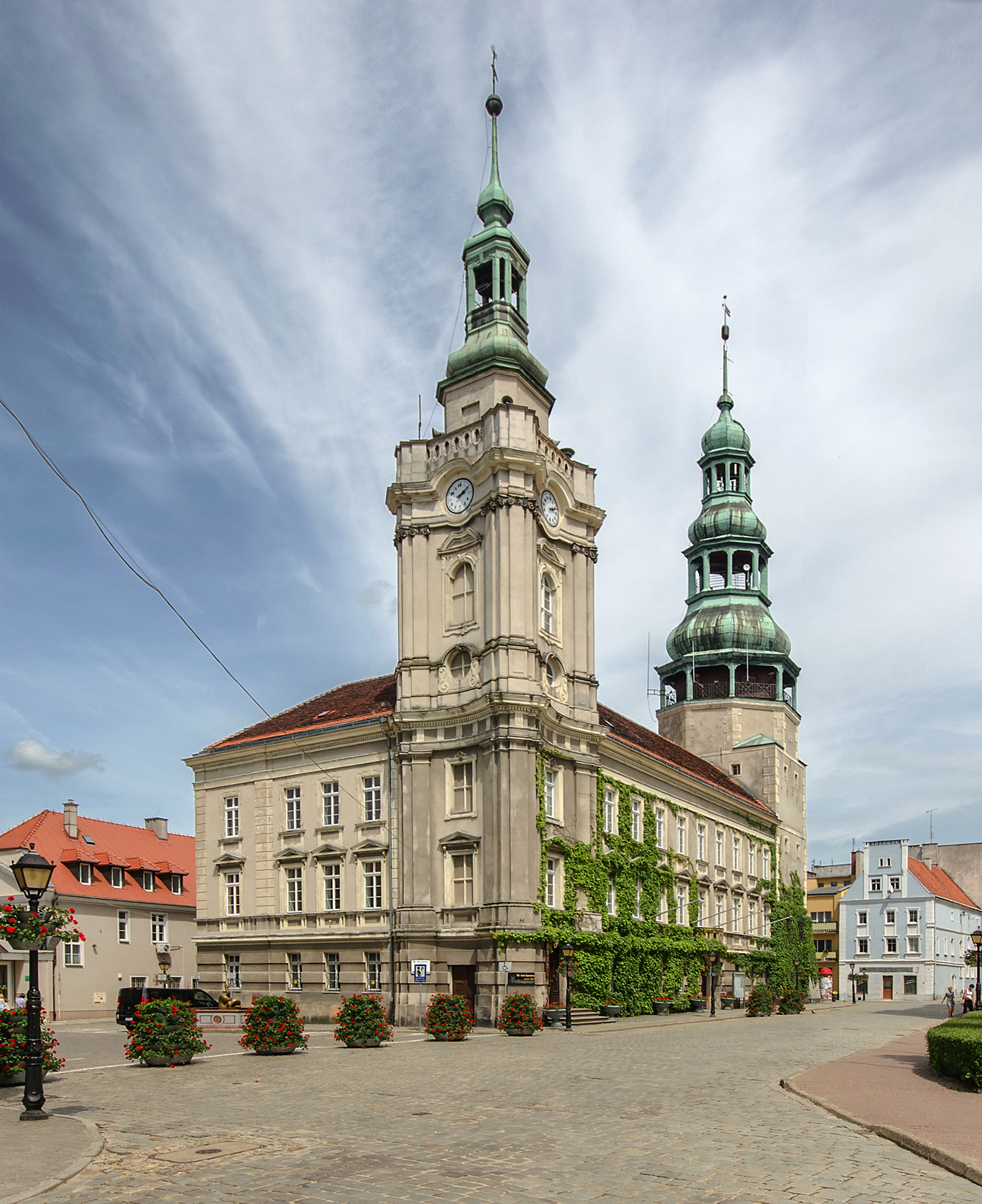 Szprotawa, ratusz, 1583-1586, XVII, XIX